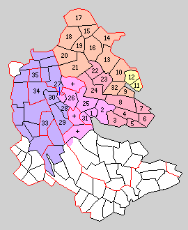 新治郡の町村